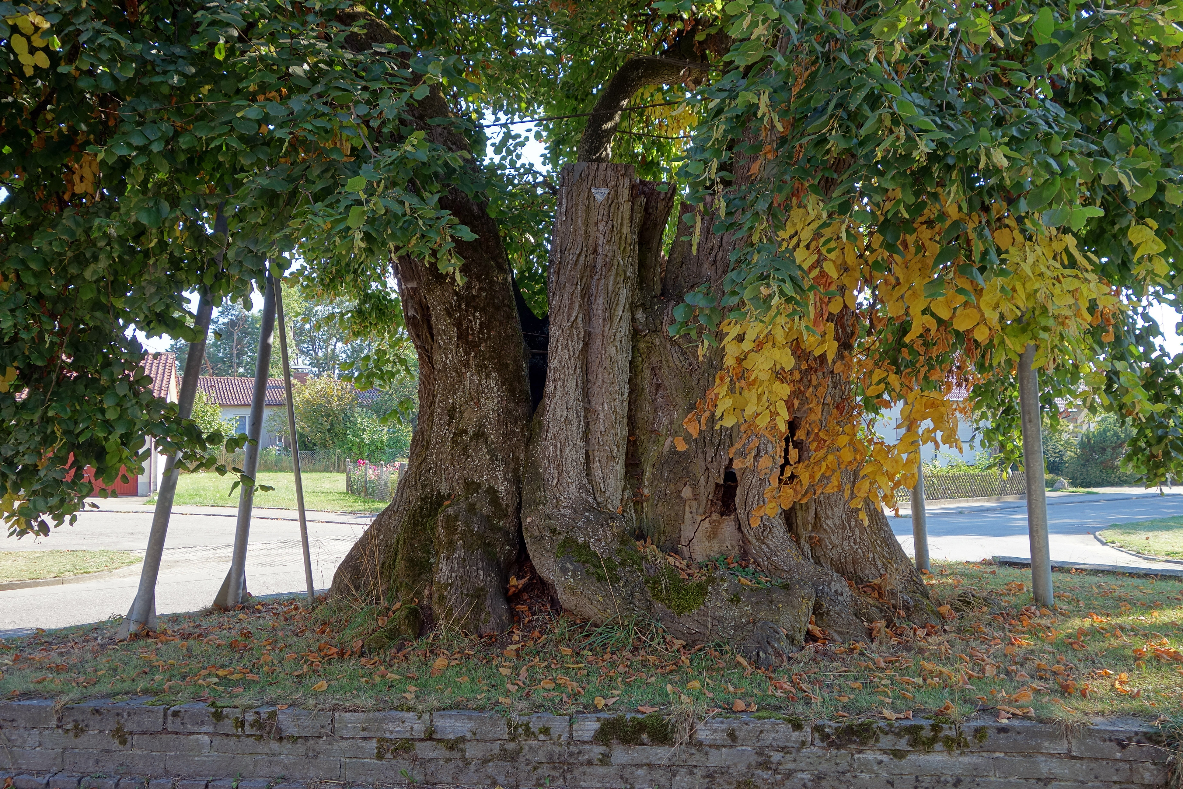 Linde Hohenbodman